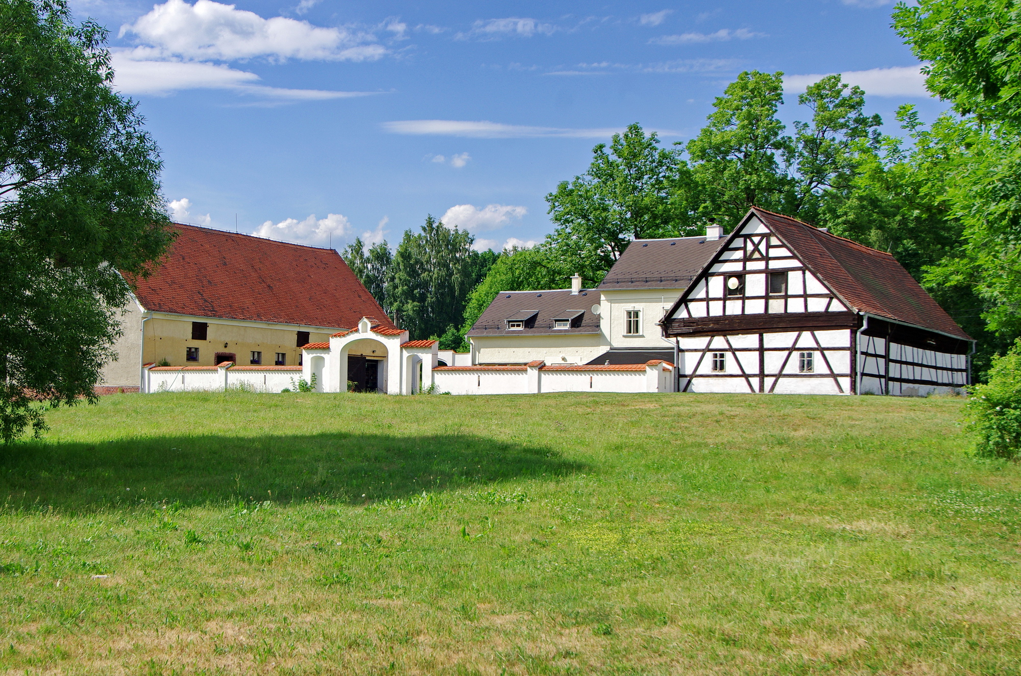 Horka, část obce Nový Kostel, venkovská usedlost, okres Cheb